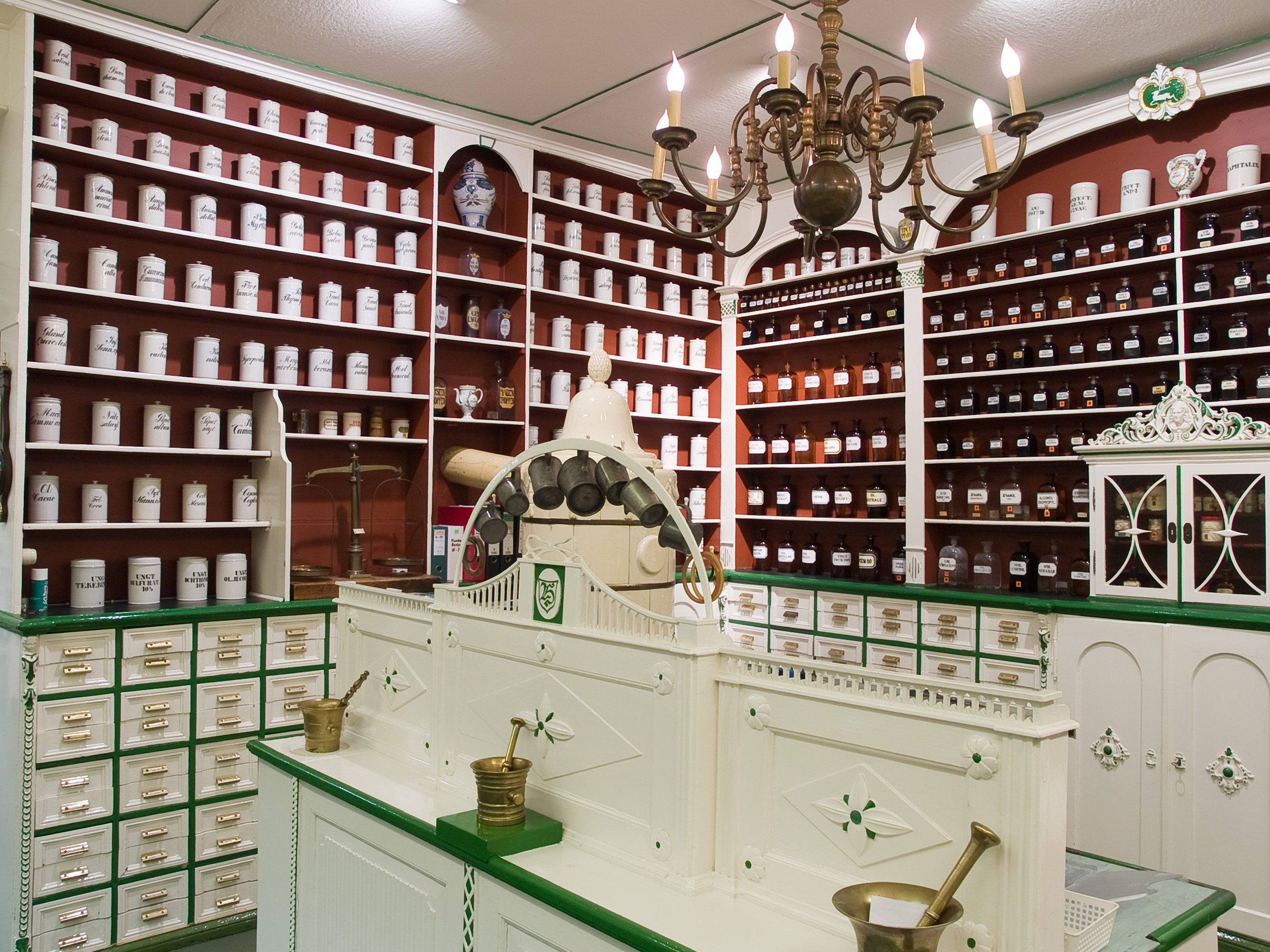 Offizin der Hirschapotheke, Goslar